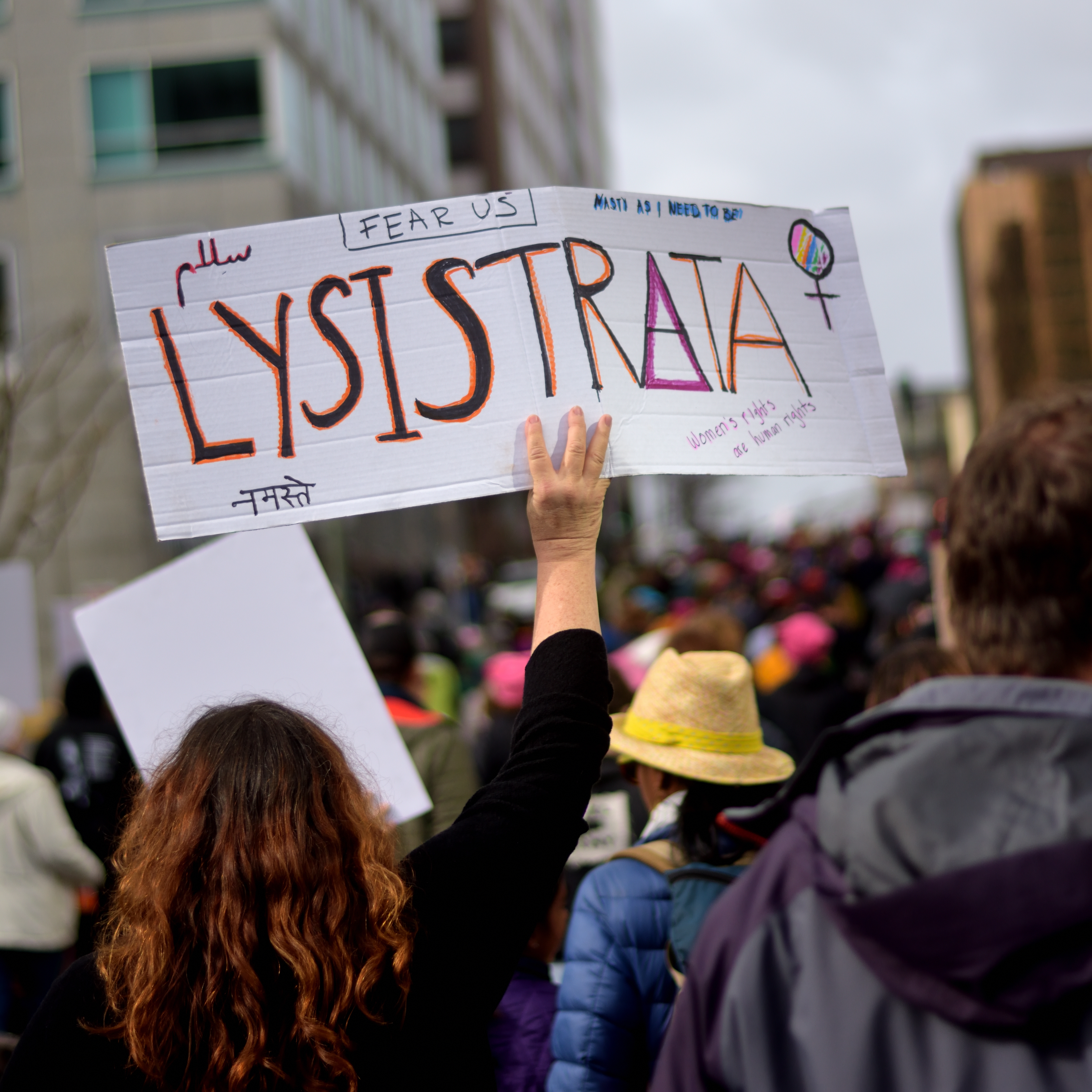 Oakland, CA